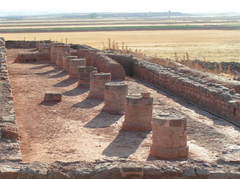 Columnata del Edificio columnado de Jamila, durante el proceso de excavación 2009.